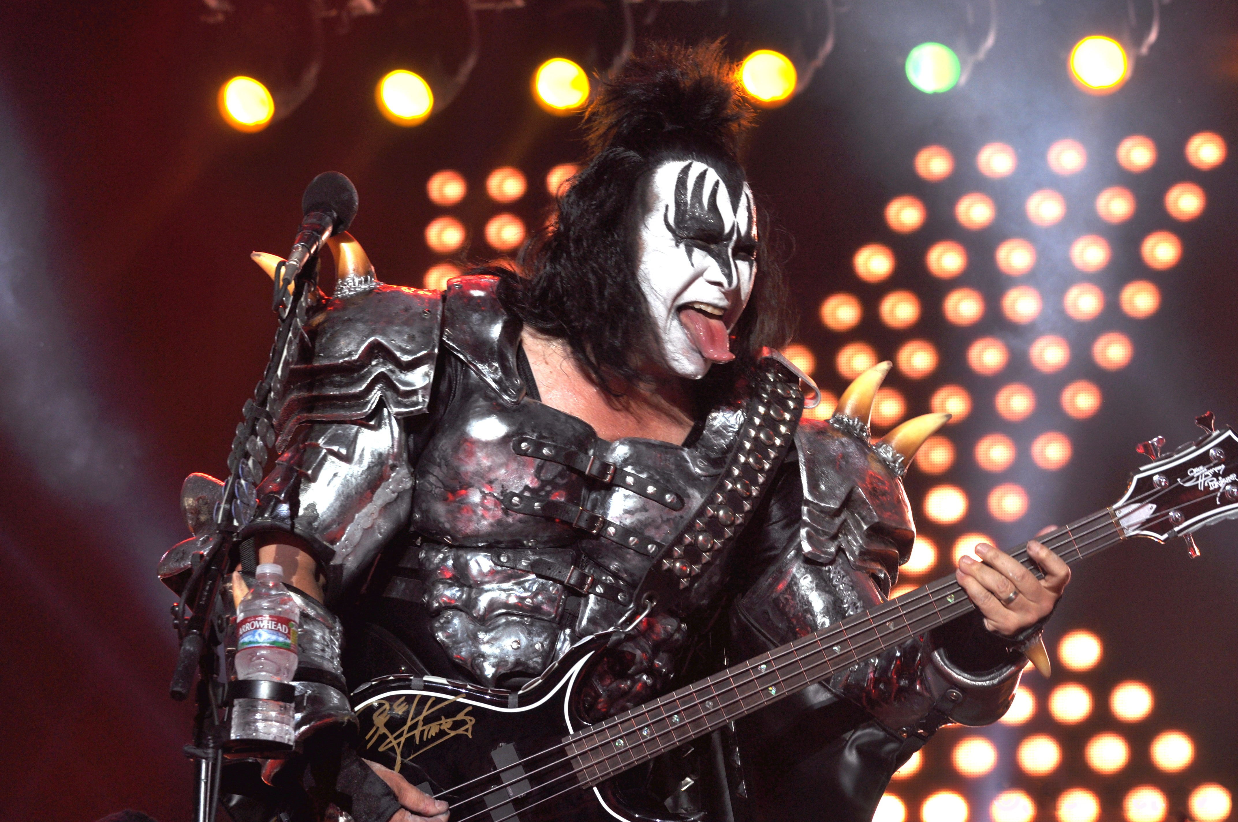 KISS -DSC_1474- 8.29.12